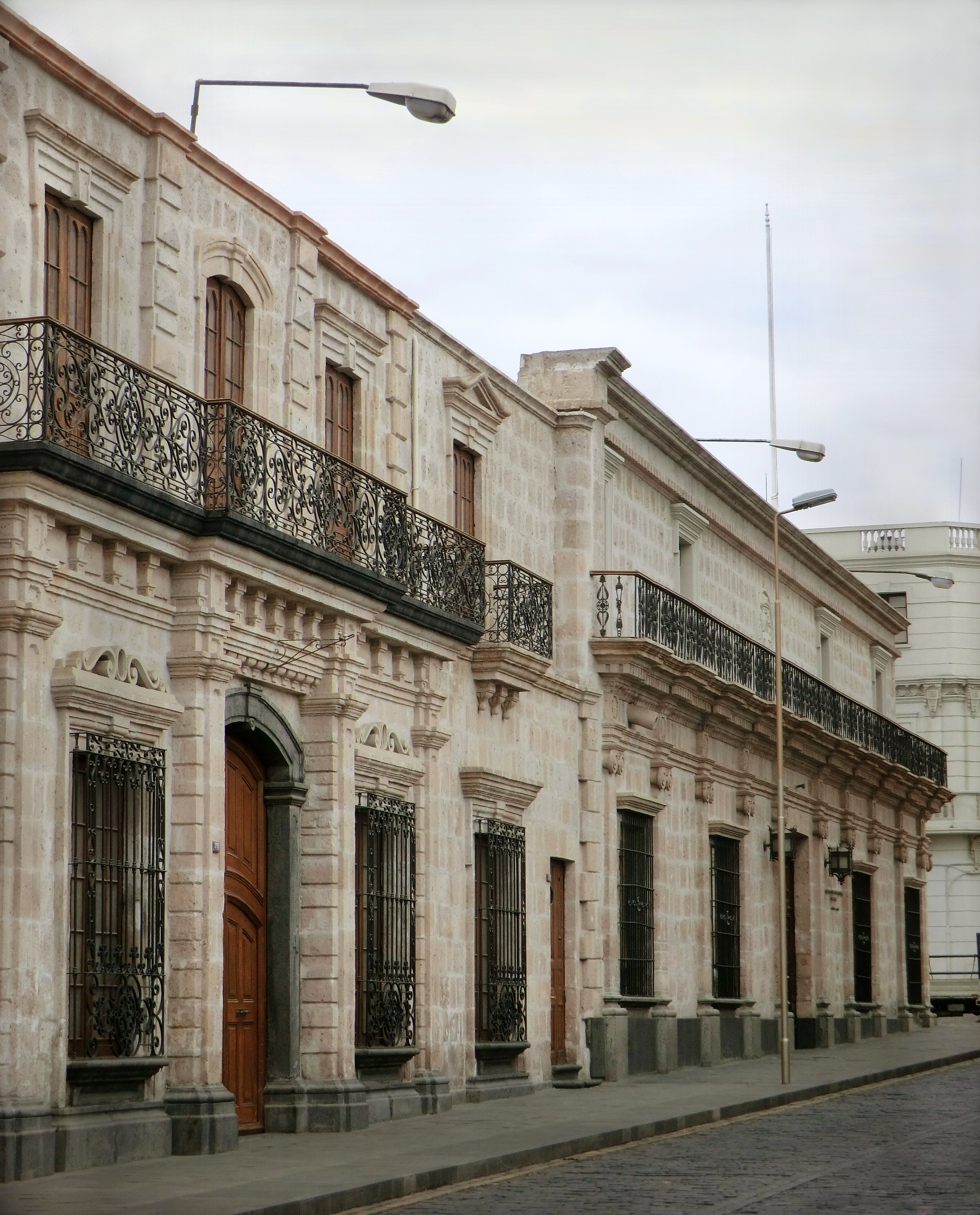 Calle más artistocratica de Arequipa